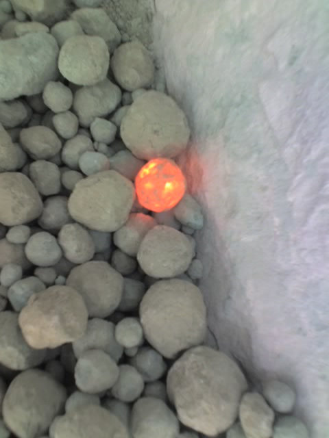 White clinker after kiln exit.